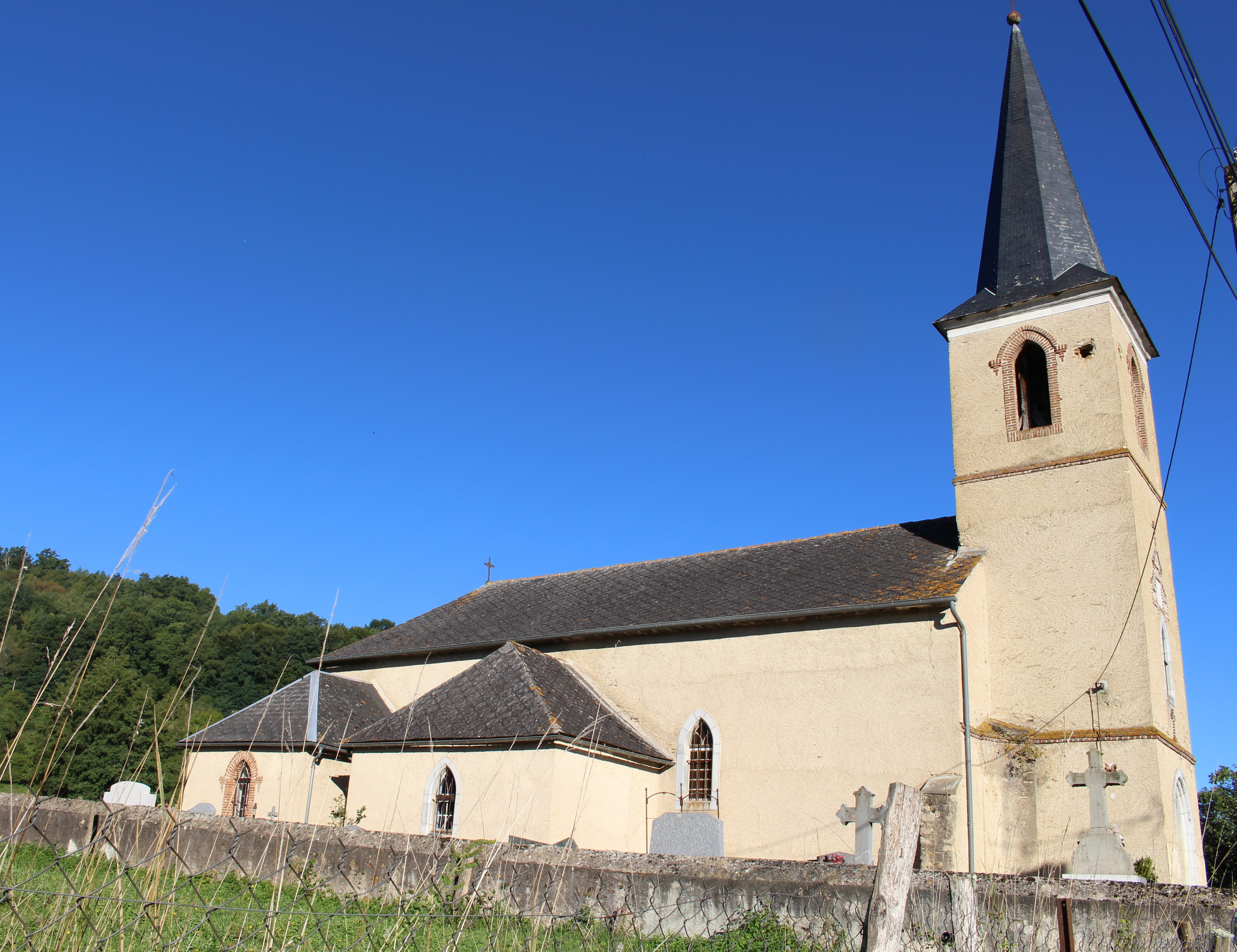 Église d'Ozon-Darré (Hautes-Pyrénées)